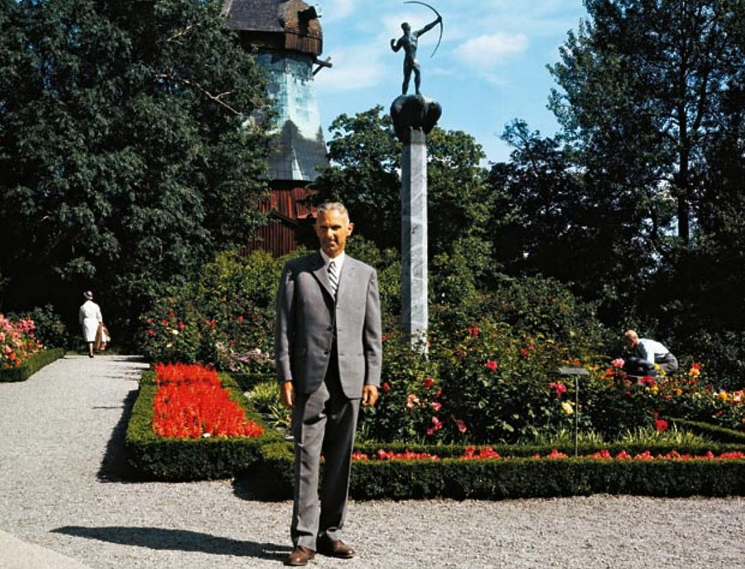 Trädgårdsmästare Ingemar Gram i trädgården till Prins Eugens Waldemarsudde